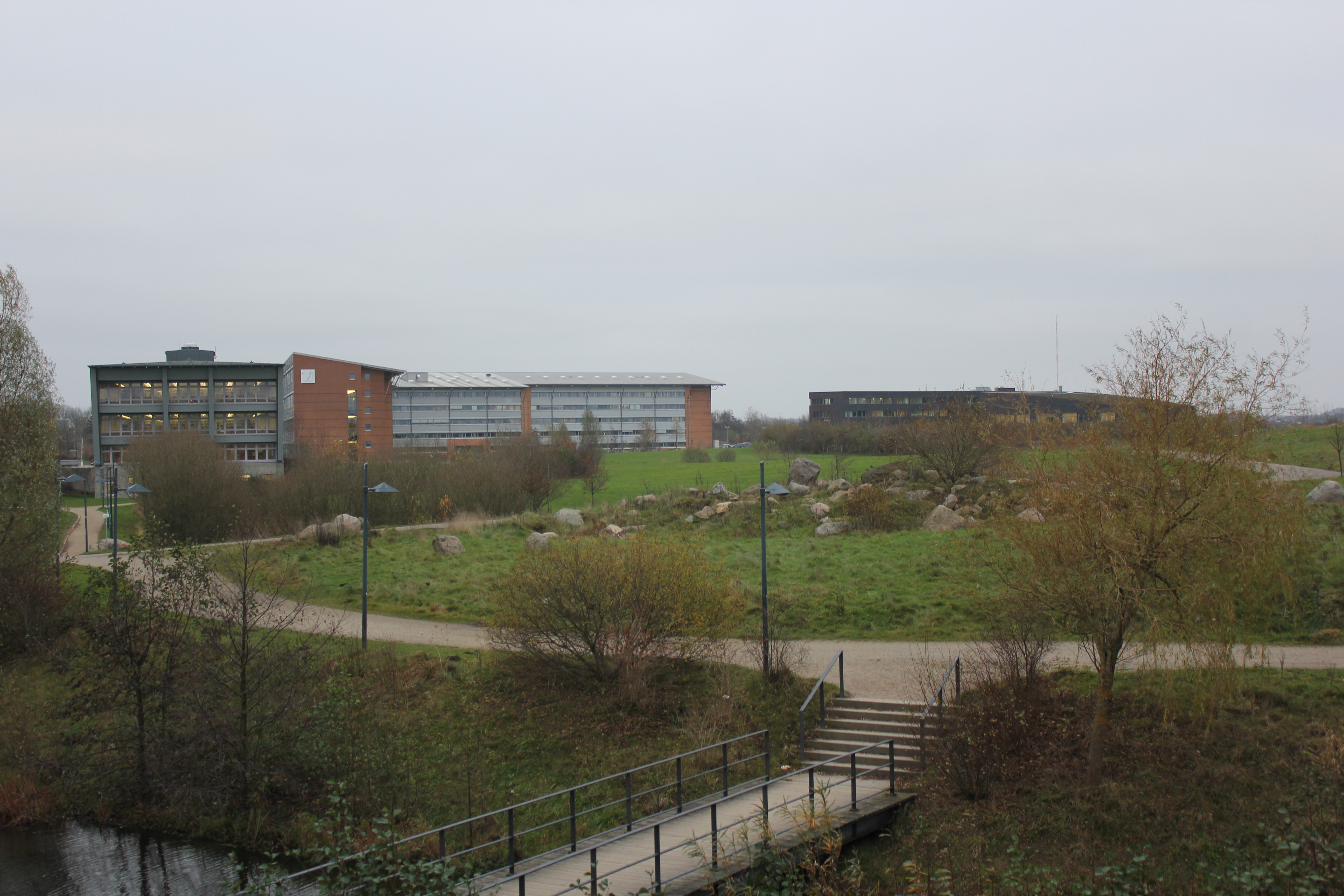 Universität Flensburg 2011